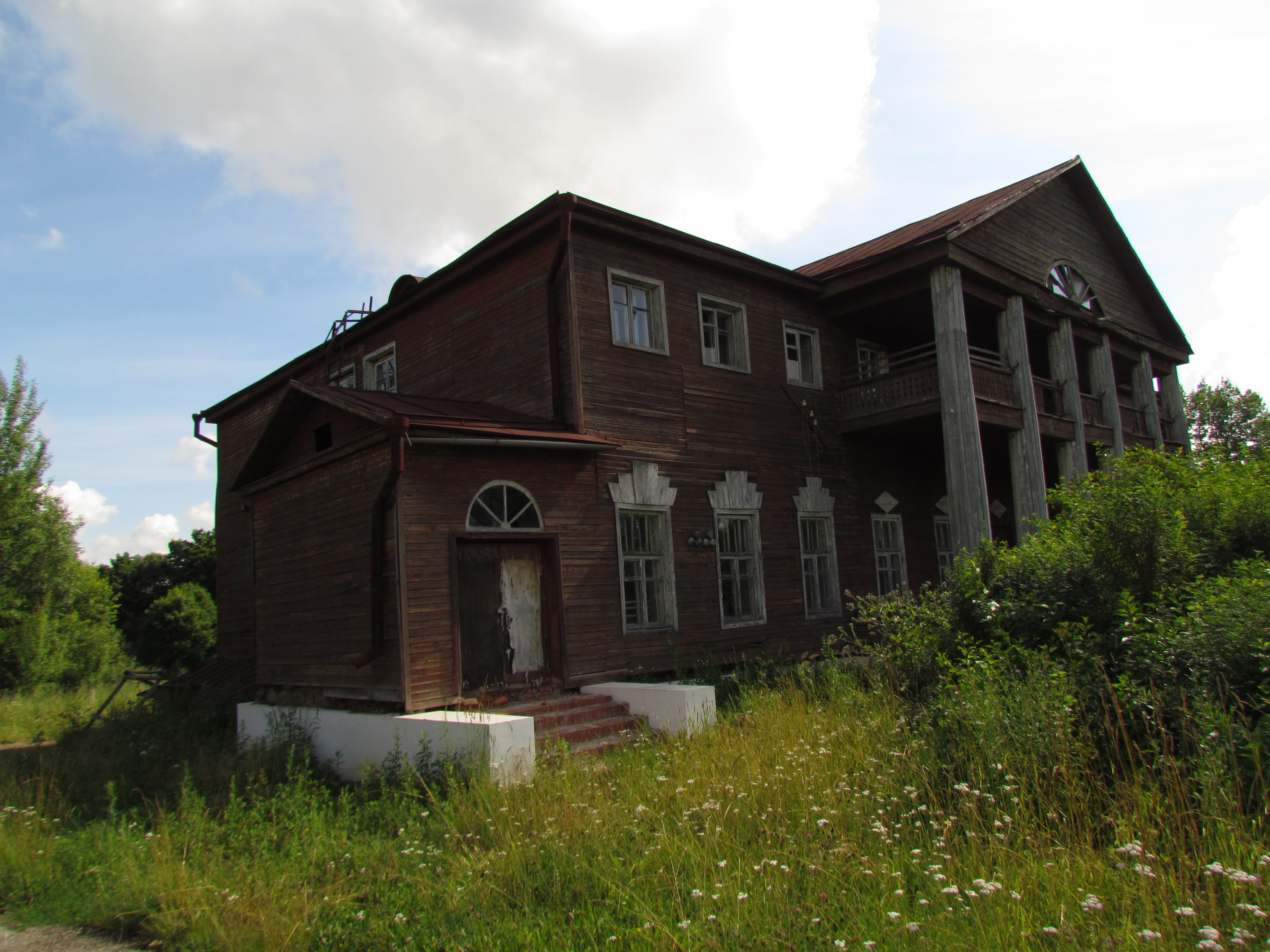 Усадьба кудрявцевых (Калужская область, Малоярославец, село панское)